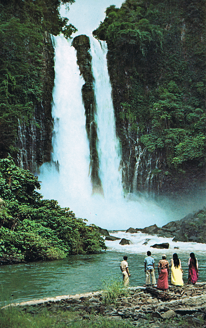 Maria Cristina Falls Iligan City